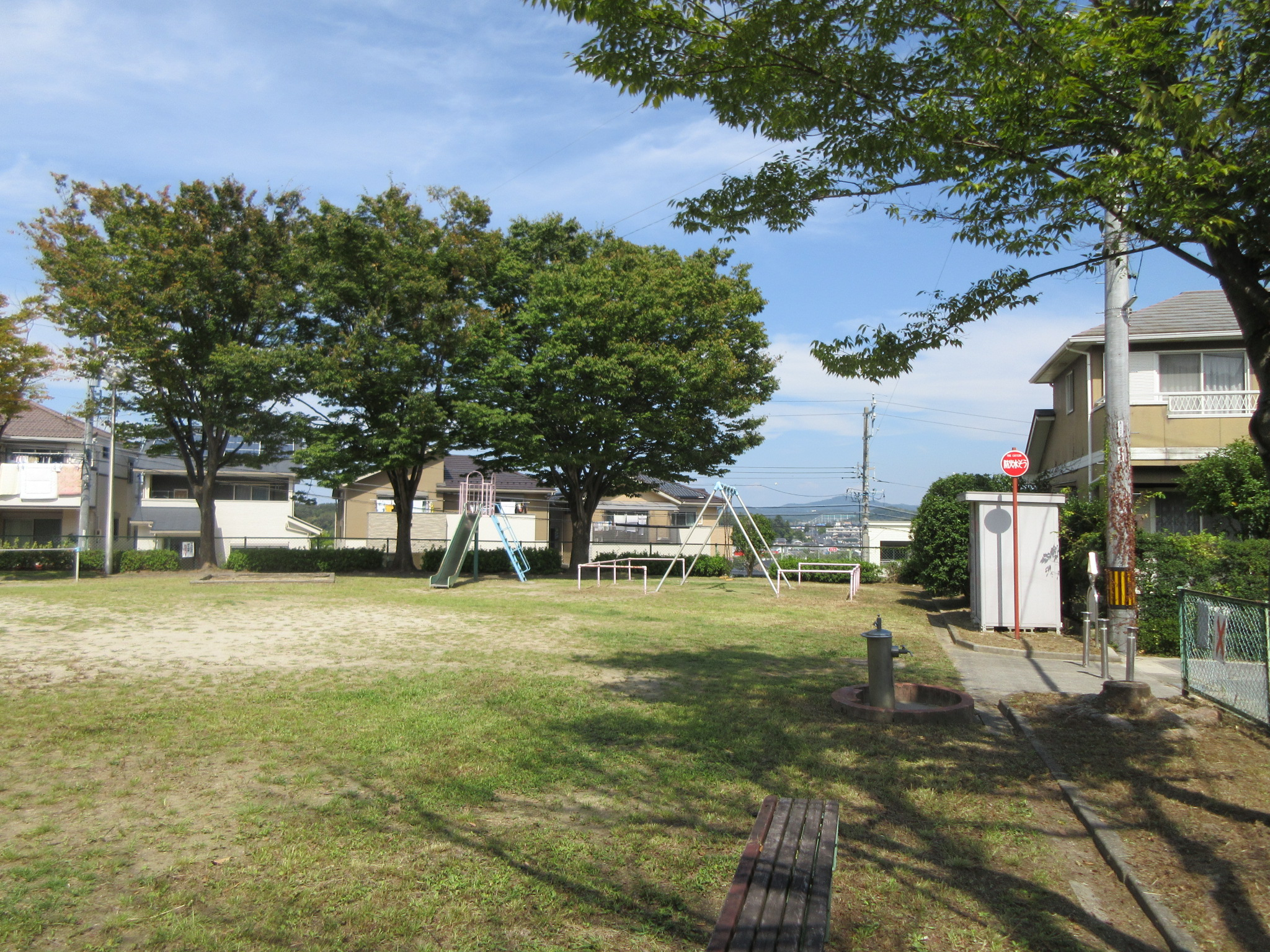 稲熊東公園（岡崎市稲熊町）